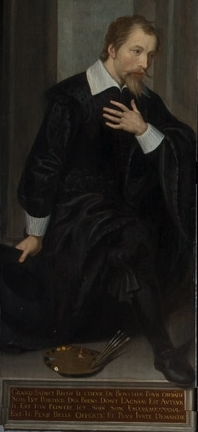 Autoportrait de l'artiste agenouillé ; Portrait de Jean Boucher ; Le peintre à génuflexion, palette et pinceaux à ses pieds, le bras droit pend le long du corps et la main tient un chapeau, la main gauche est appuyée sur la poitrine. detail